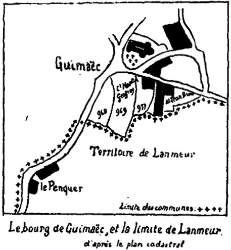 Le bourg de Guimaëc est limitrophe du territoire de la commune (anciennement paroisse) de Lanmeur (René Largillière, "Les saints et l'organisation chrétienne primitive dans l'Armorique bretonne", 1925).